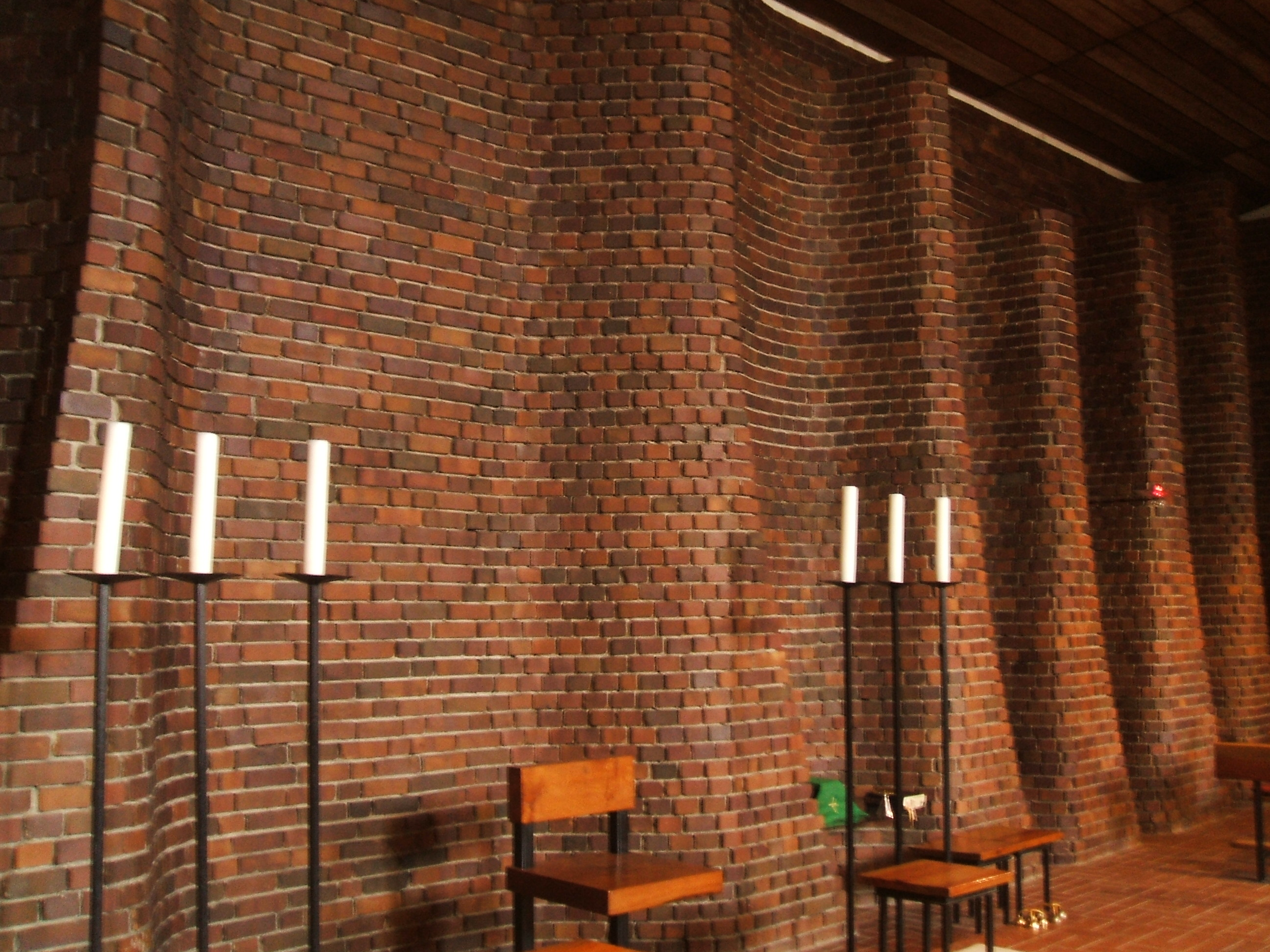 Wandgestaltung "Rotes Meer" in der Stralsunder katholischen Dreifaltigkeitskirche